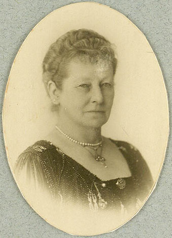 Marie Sophie Henriette von Rosen (1857-1940), Danish noblewoman